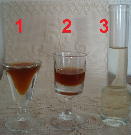 Verres à alcool ou spiritueux, "verre faux-cul" (1) de 1cl, verre normal à liqueur (2) de 2,5cl, verre à vodka (3)